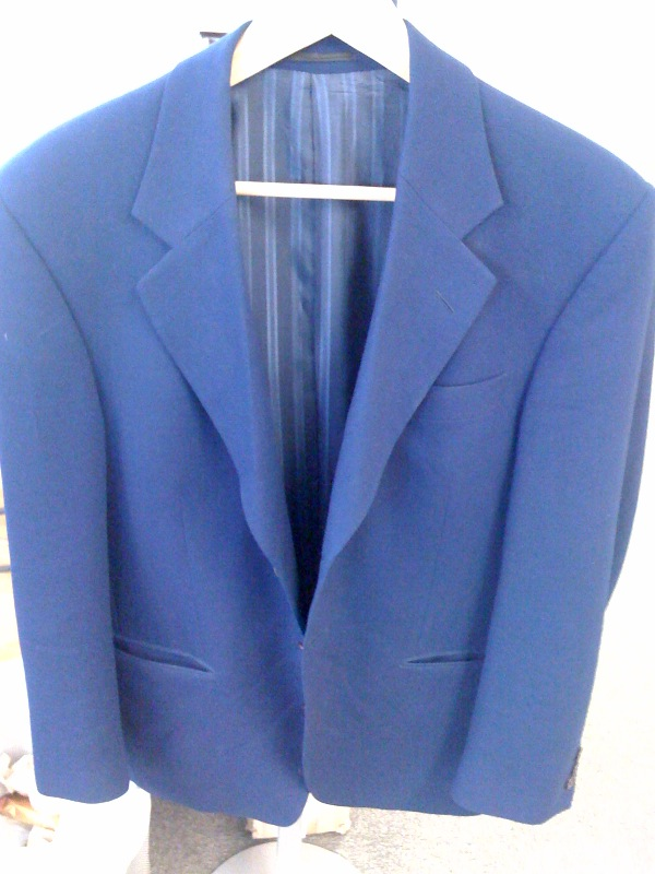 Blå Kavaj